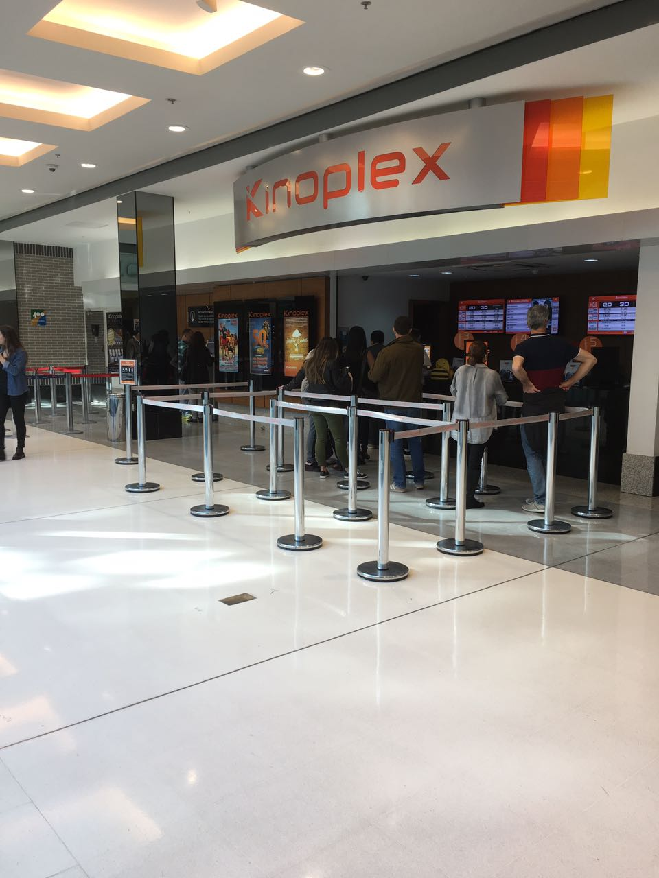 Vista da área externa do Kinoplex Vila Olímpia de São Paulo, SP